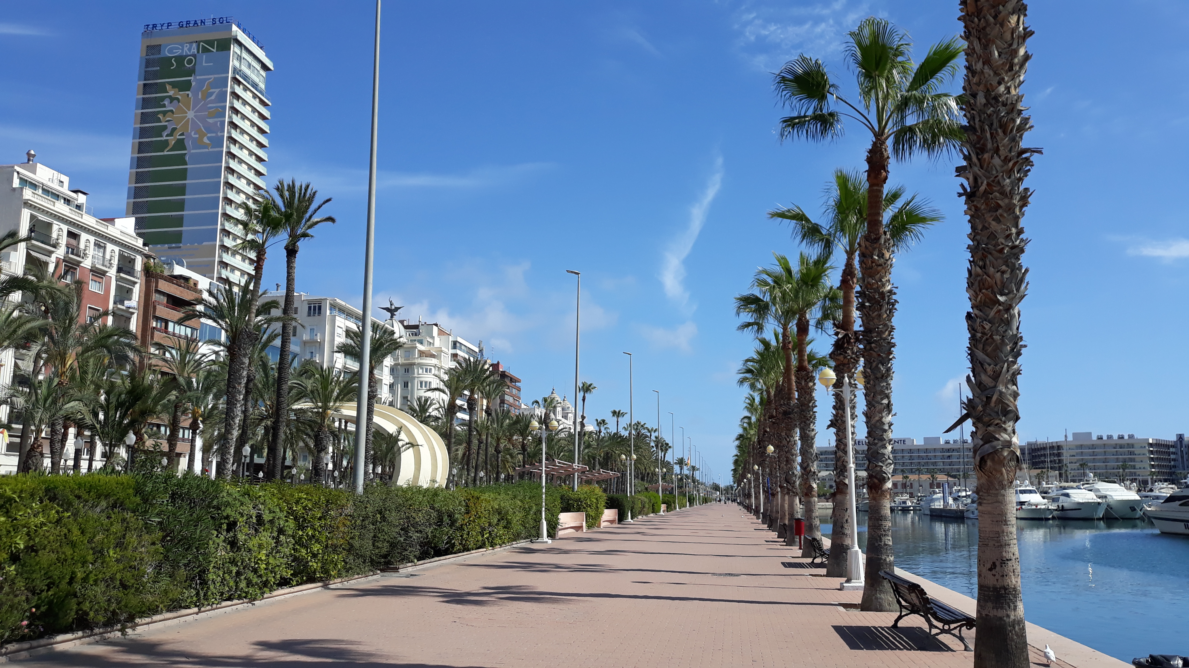 Paseo de los Mártires de la Libertad. A la izquierda, el edificio Gran Sol. A la derecha, el puerto deportivo de Alicante.